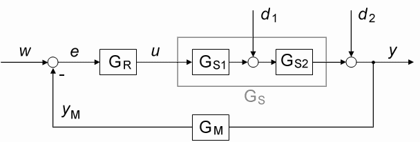 Blockschaltbild eines Standardregelkreises